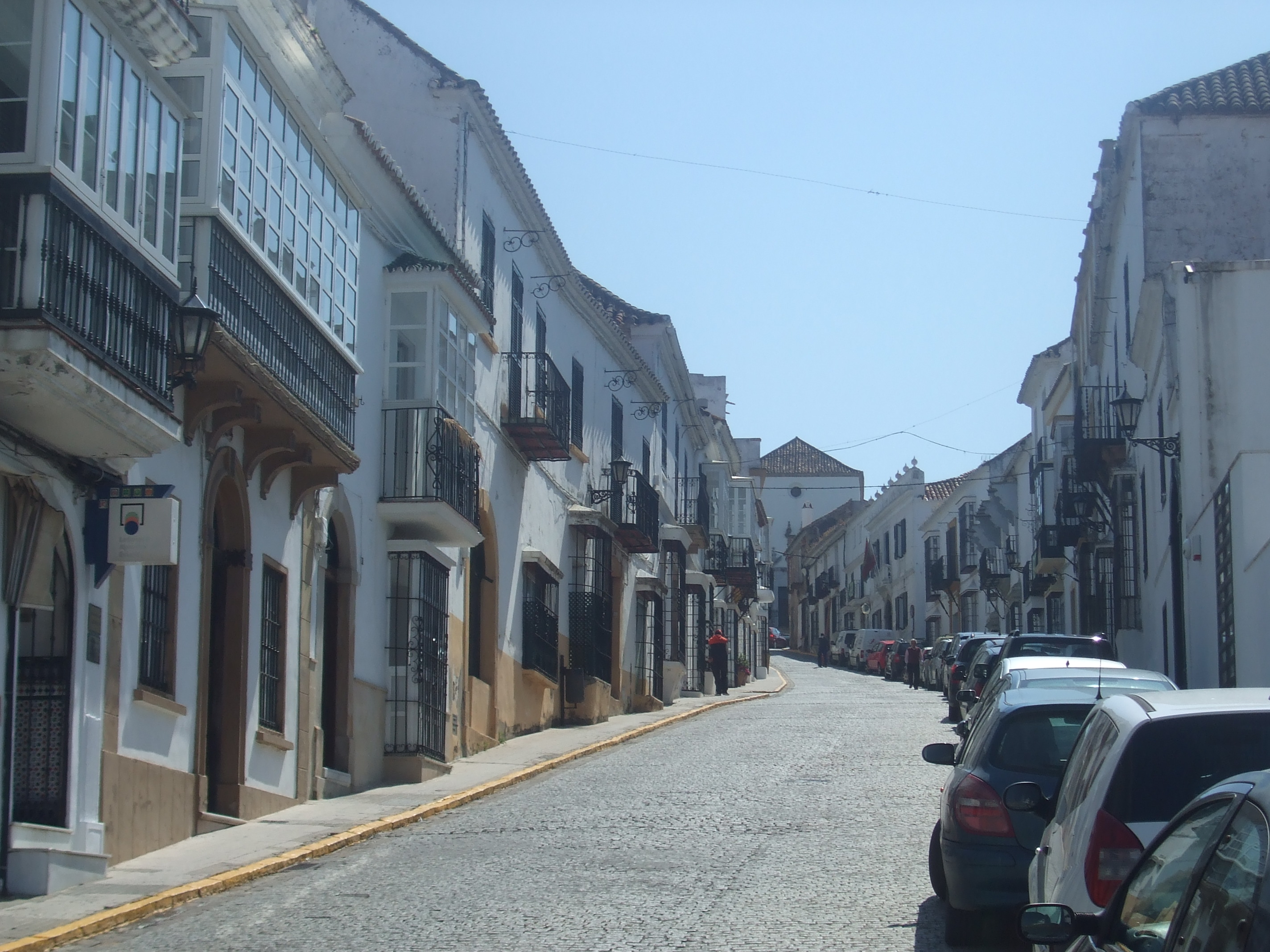 Calle San Felipe, San Roque.